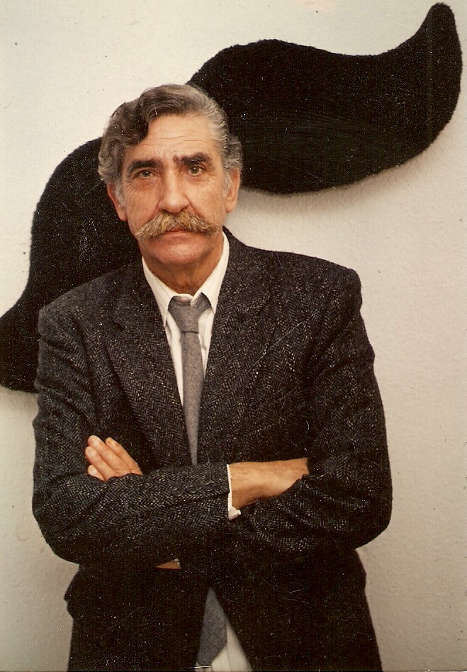 Foto de Javier Basilio en La Manga del Mar Menor realizada por su hijo